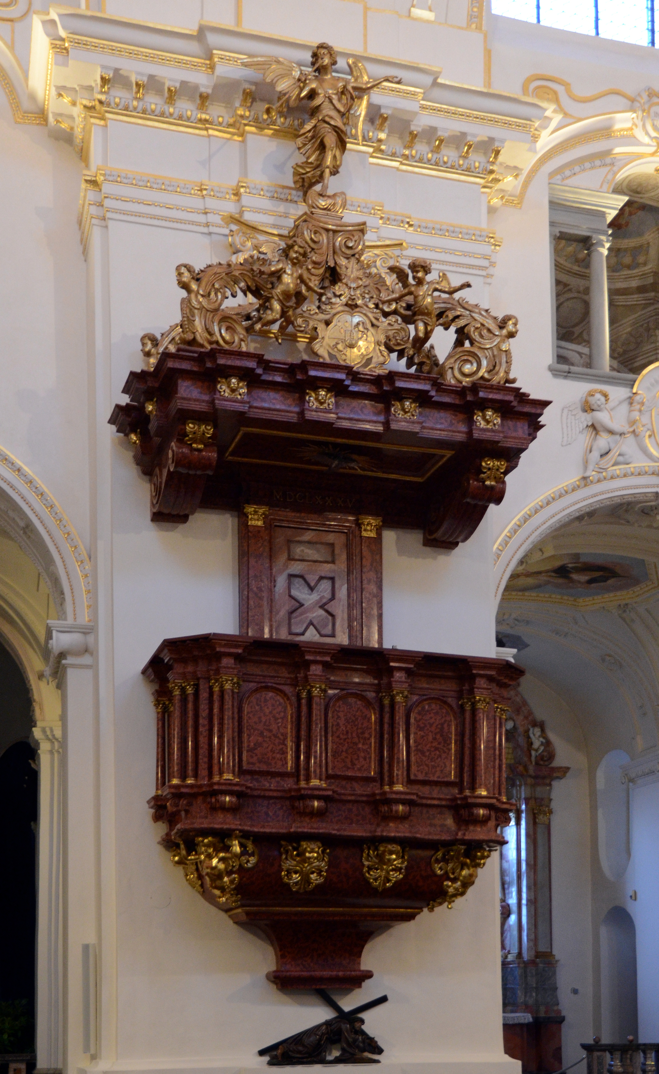 Basilika St. Lorenz in Kempten, Kanzel